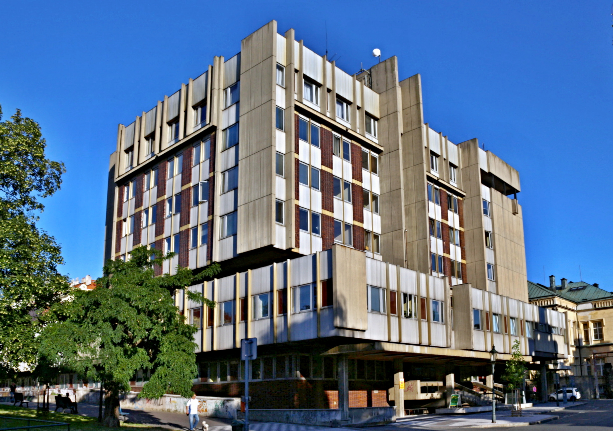 Všeobecná fakultní nemocnice v Praze